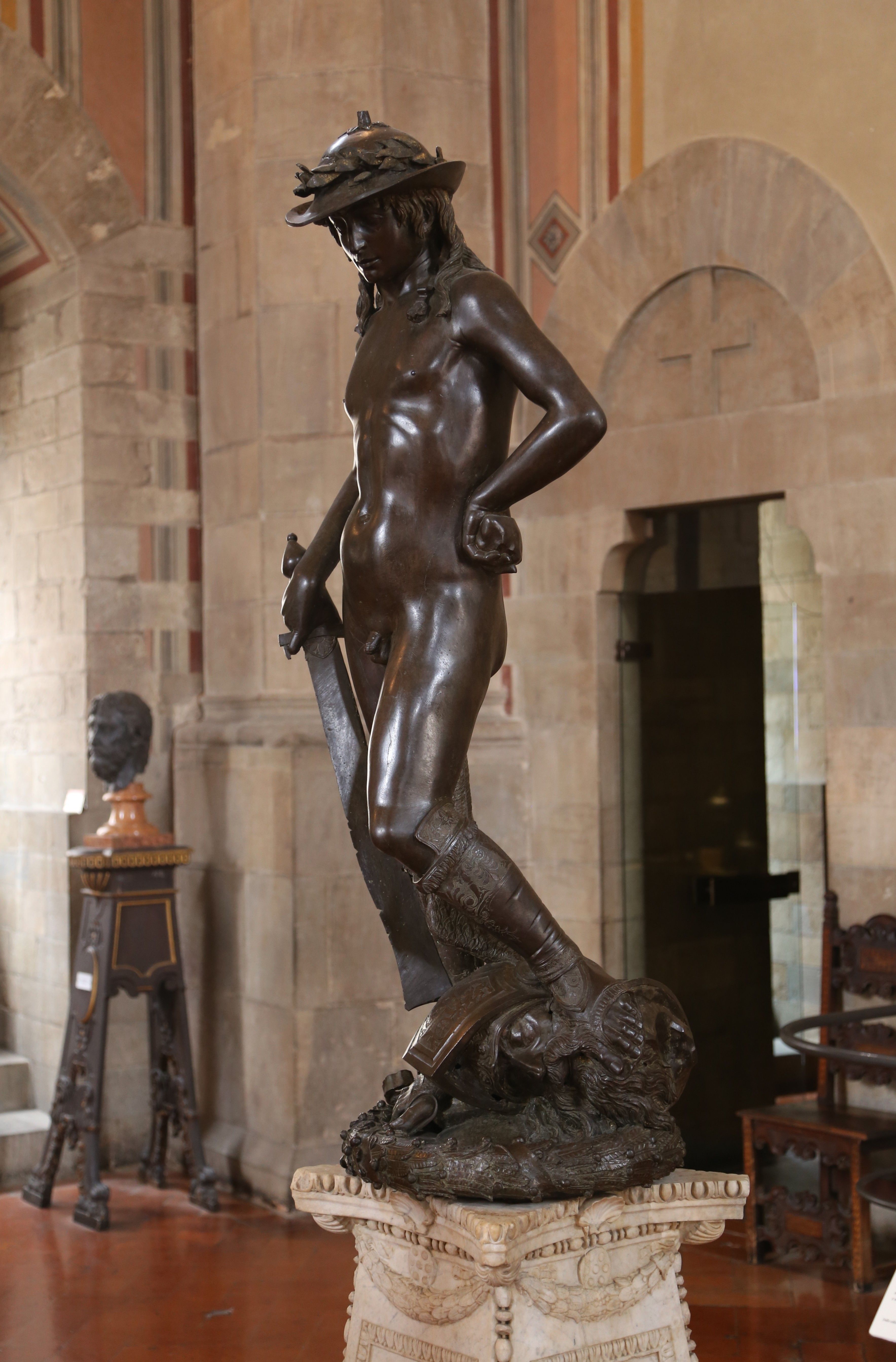 David, Donatello, ca. 1440, Bronze, Museo del Bargello, Florenz